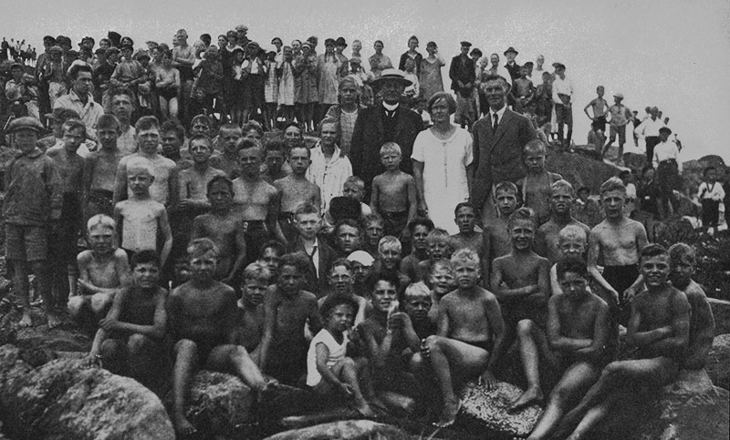 Henrik Allard (1861-1941)